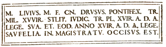 Elogium van Marcus Livius Drusus minor met zijn cursus honorum. Inscriptie uit Rome. CIL VI 1312 (p. 3134, 3799, 4678) = CIL I, p. 199 = InscrIt-13-3, 74 = ILS 49. M(arcus) Livius M(arci) f(ilius) C(ai) n(epos) Drusus / pontifex tr(ibunus) mil(itum) Xvir stlit(ibus) iudic(andis) / tr(ibunus) pl(ebi) Xvir a(gris) d(andis) a(dsignandis) lege sua / et eodem anno Vvir a(gris) d(andis) a(dsignandis) lege Saufeia / in magistratu occisus est